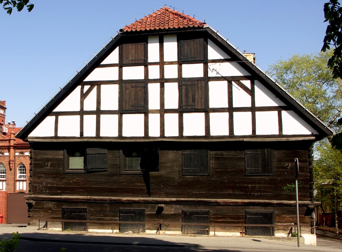 Spichrz z XIX w. we Włocławku.